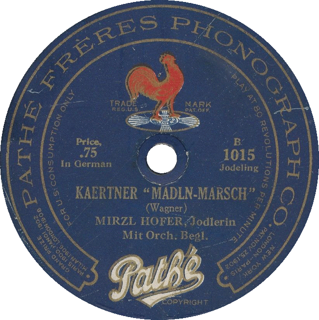 Platte Kaerntner Madln-Marsch von Mirzl Hofer, Jodlerin Mit Orch. Begl.